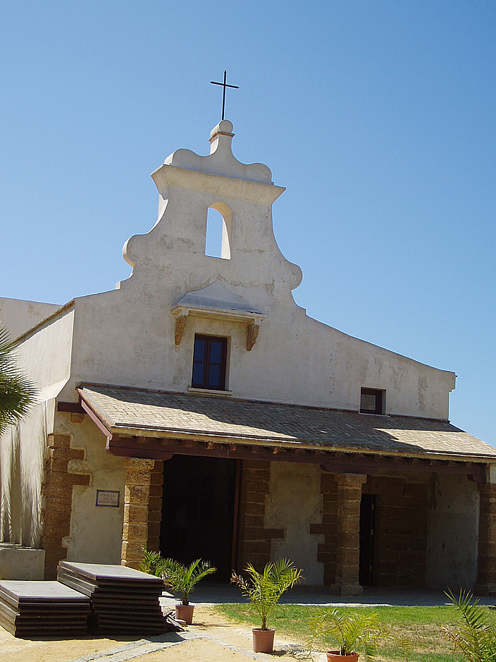 Capilla en el interior del Castillo de Sta. Catalina de Cádiz, España. Construida en 1693 por orden de Carlos II.